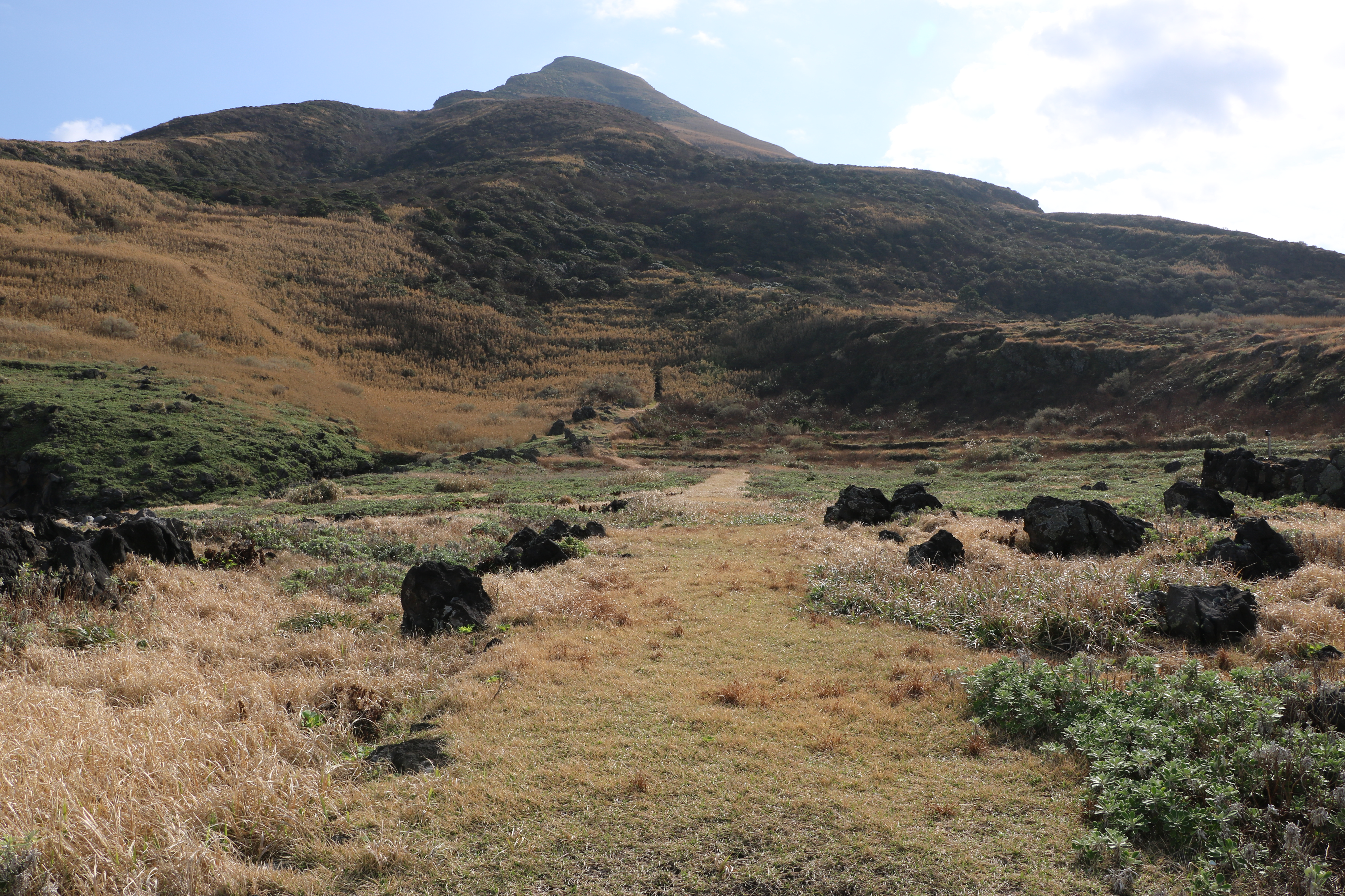 八丈小島鳥打地区より太平山を望む（東京都八丈町）